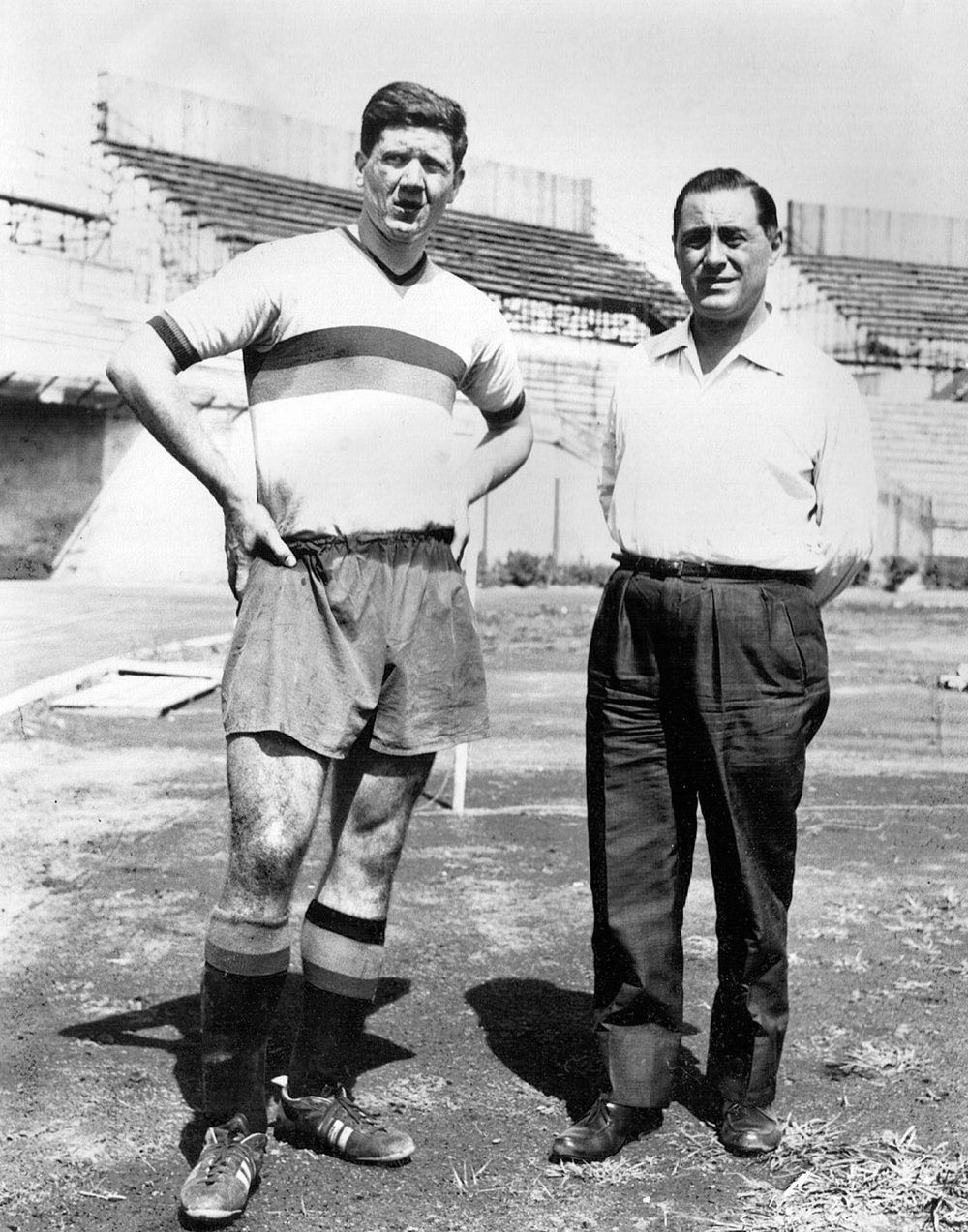 Horst Szymaniak (a sinistra) e Ignazio Marcoccio (a destra).